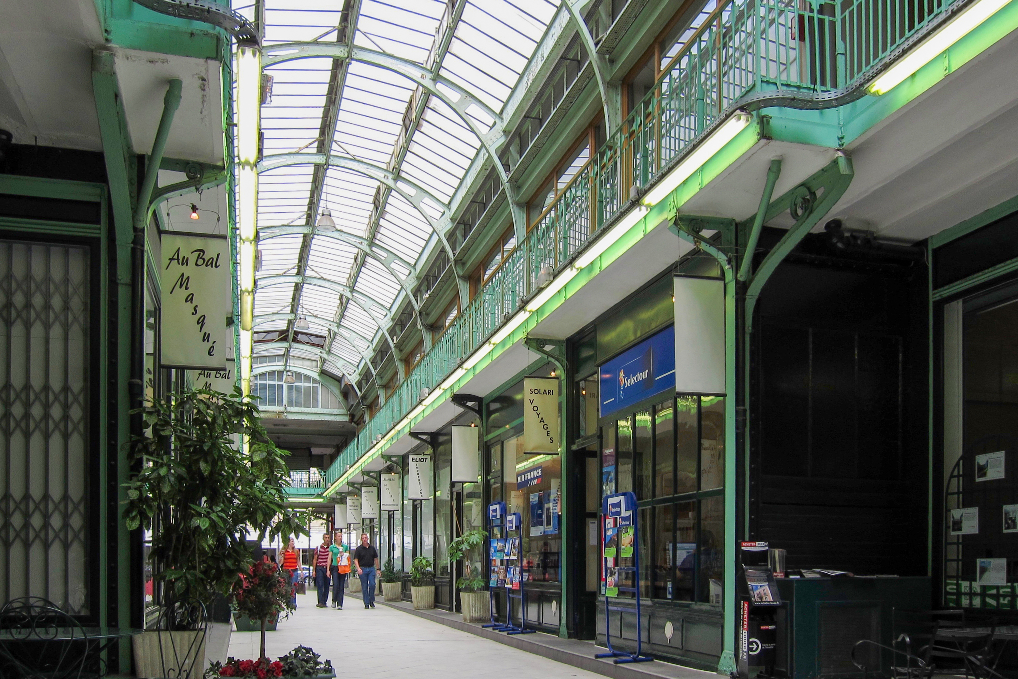 La Galerie Argentine, passage marchand au 111 avenue Victor-Hugo à Paris (France)